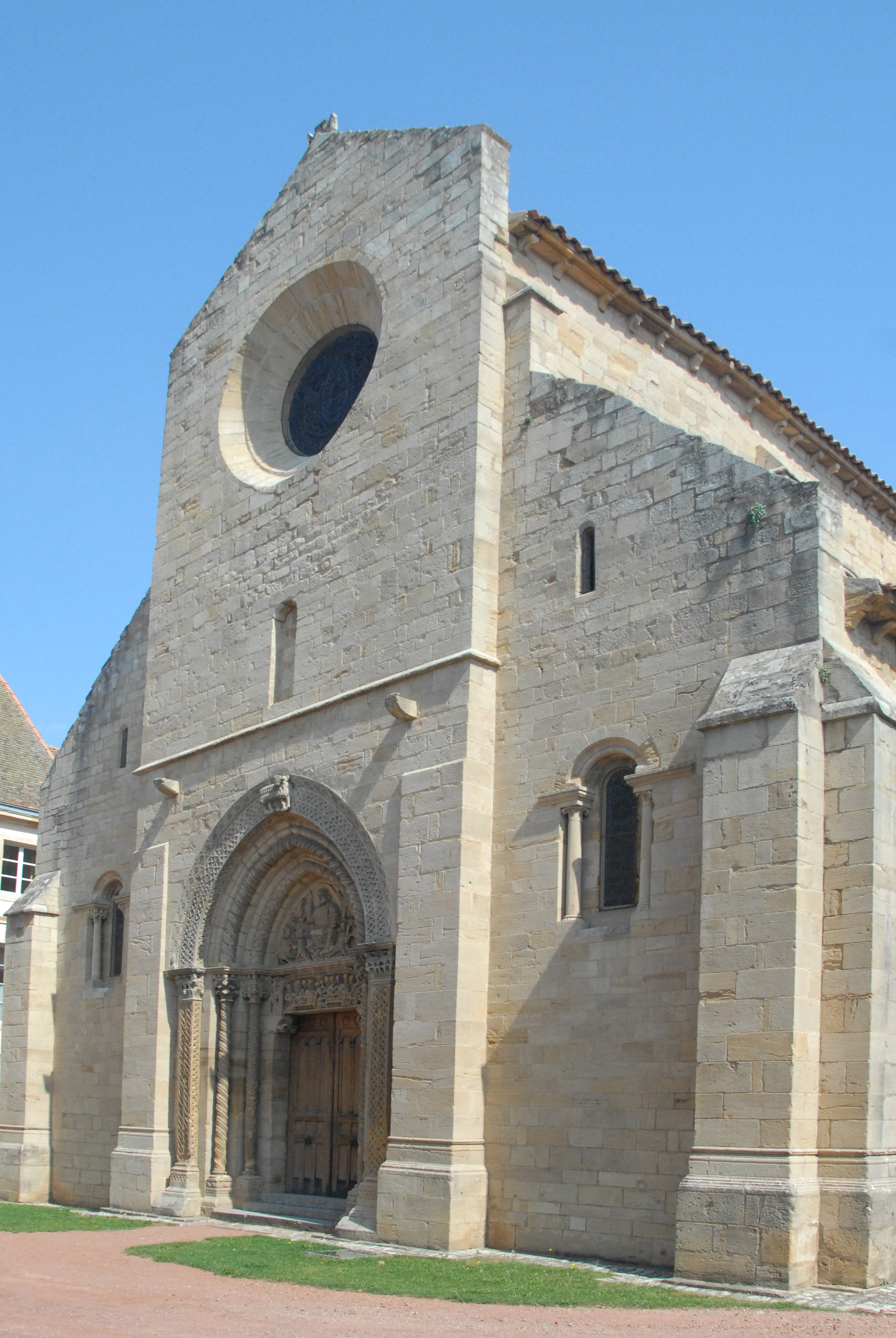 St-Hilaire de Semur-en-Brionnais, Fassade von SW